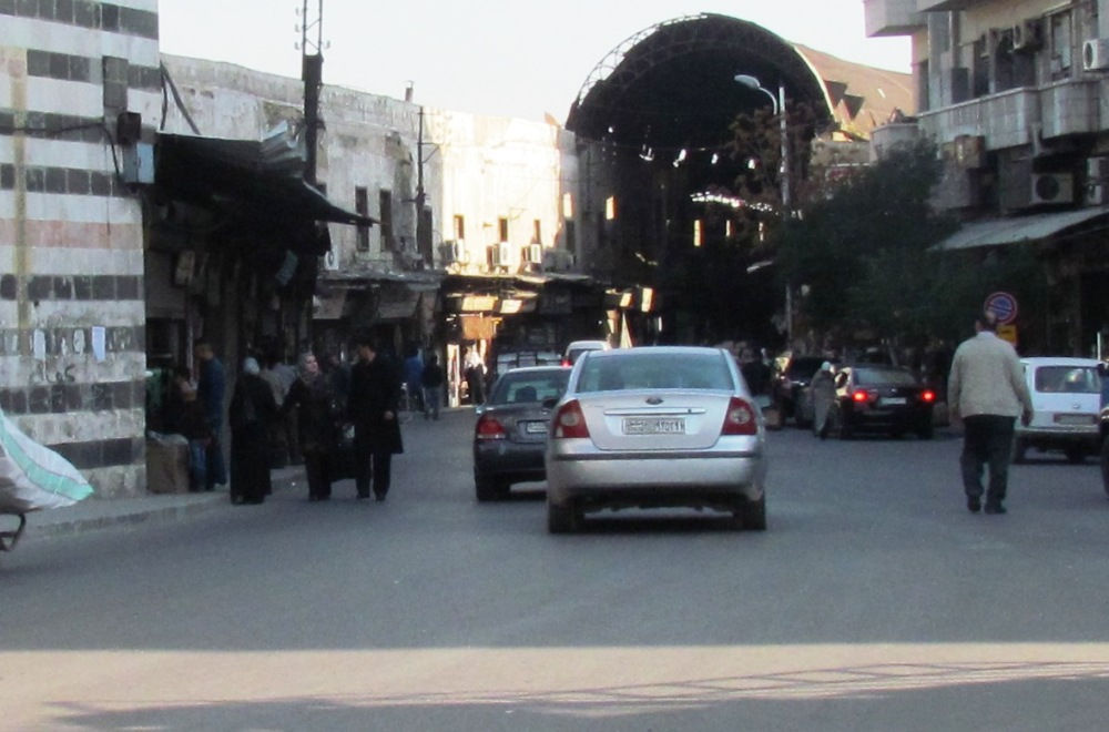 شارع البدوي و فيه محلات لبيع الجلود و الصوف